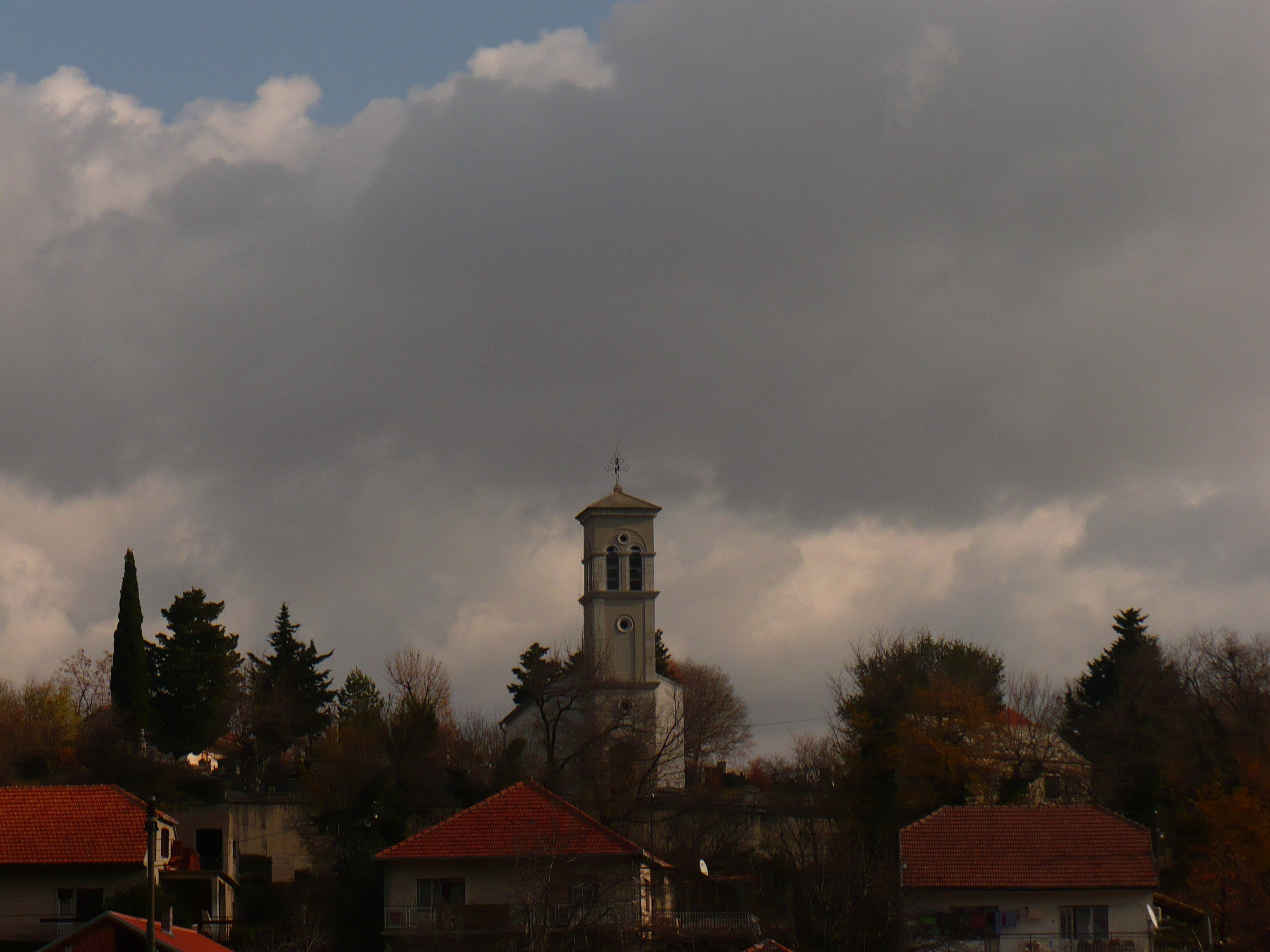 Pravoslavna crkva sv. Đurđa u Kninskom Polju